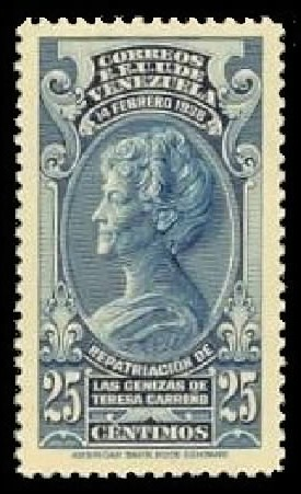 Estampilla repatriación de las cenizas de Teresa Carreño del años 1938, impres por American Bank Note Comapany, New York. Perforación 12.Nª de catálogo * según Aurelio Blanco: 265. Blanco, Aurelio. 2009: Venezuela Catálogo especializado de estampillas. Caracas. 183p. ISBN 980-300-176-0